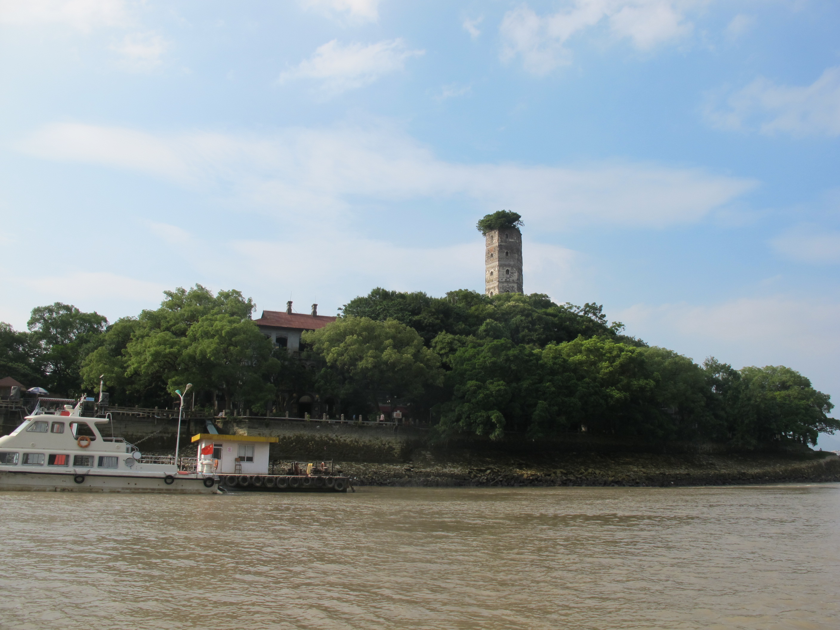 江心屿东塔